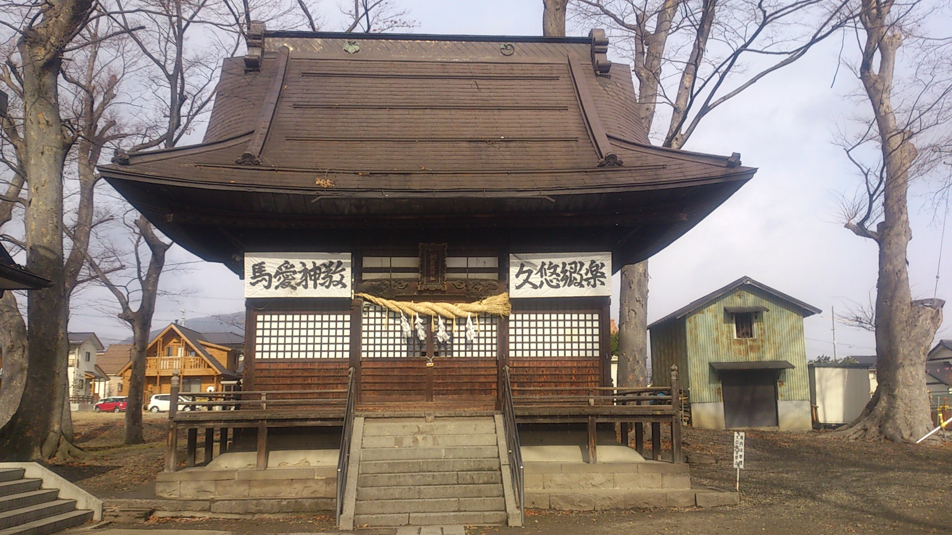 桐原牧神社（長野県長野市桐原二丁目）